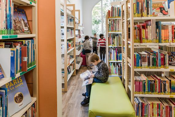 enfant lisant sur une banquette de la bibliothèque du Centre de Maisons-Alfort